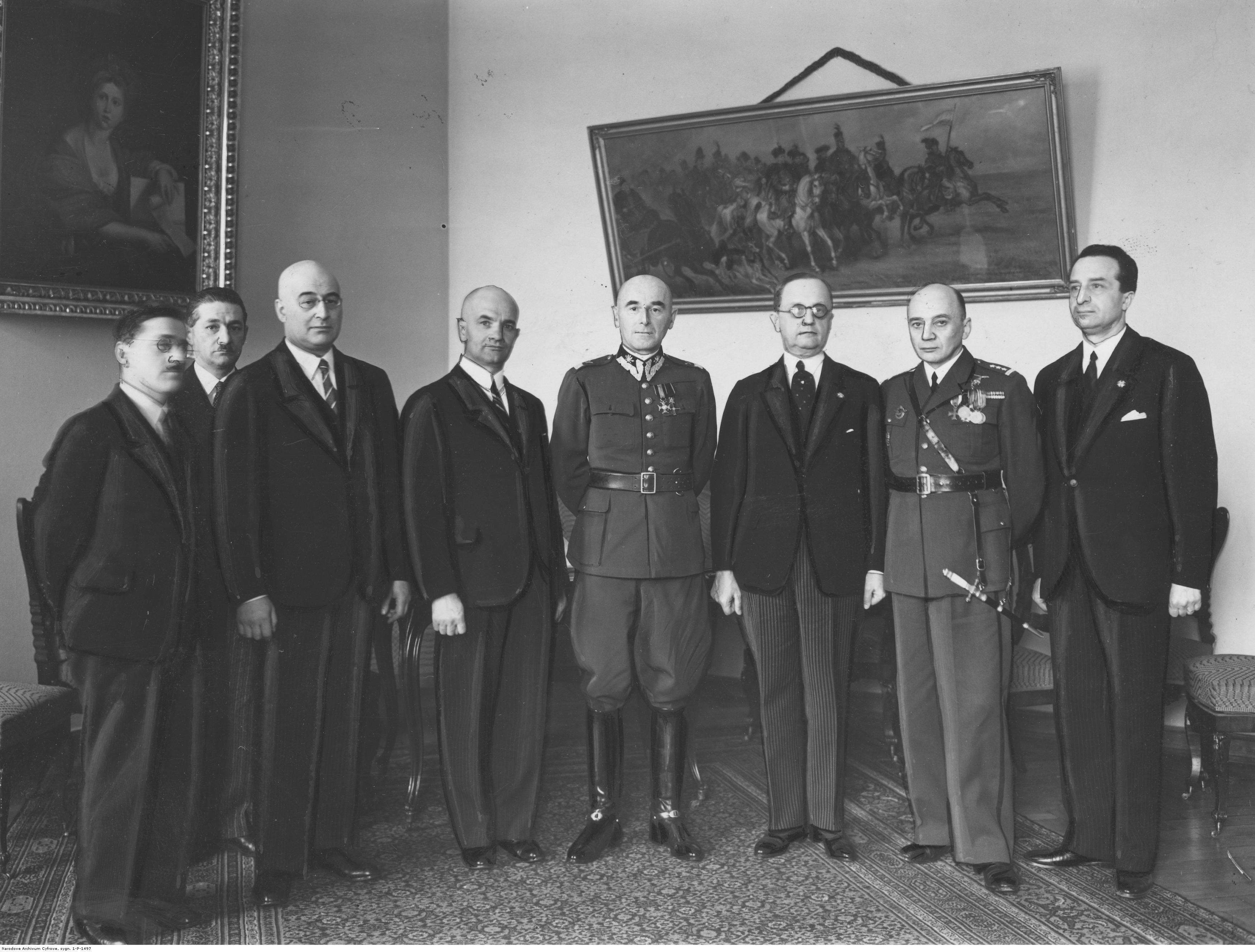 Wizyta delegacji zarządu głównego Stowarzyszenia Weteranów byłej Armii Polskiej we Francji u marszałka Edwarda Rydza-Śmigłego. Marszałek Edward Rydz-Śmigły (5. z lewej) w otoczeniu członków Zarządu Głównego Stowarzyszenia. Widoczni m.in.: prezes Stowarzyszenia Weteranów byłej Armii Polskiej we Francji Józef Wielowieyski (6. z lewej), płk WP w stanie spoczynku Sergiusz Abżółtowski, płk WP w stanie spoczynku S. Markus, wiceprezes Zarządu Głównego Stowarzyszenia Weteranów byłej Armii Polskiej we Franchcji Stefan Uhma (1. z lewej), ekspert "Polskiego Eksportu Zamorskiego" T. Cybulski i prezes Federacji Polskiego Związku Obrońców Ojczyczny Roman Górecki (4. z lewej). Koncern Ilustrowany Kurier Codzienny - Archiwum Ilustracji. Sygnatura: 1-P-1497